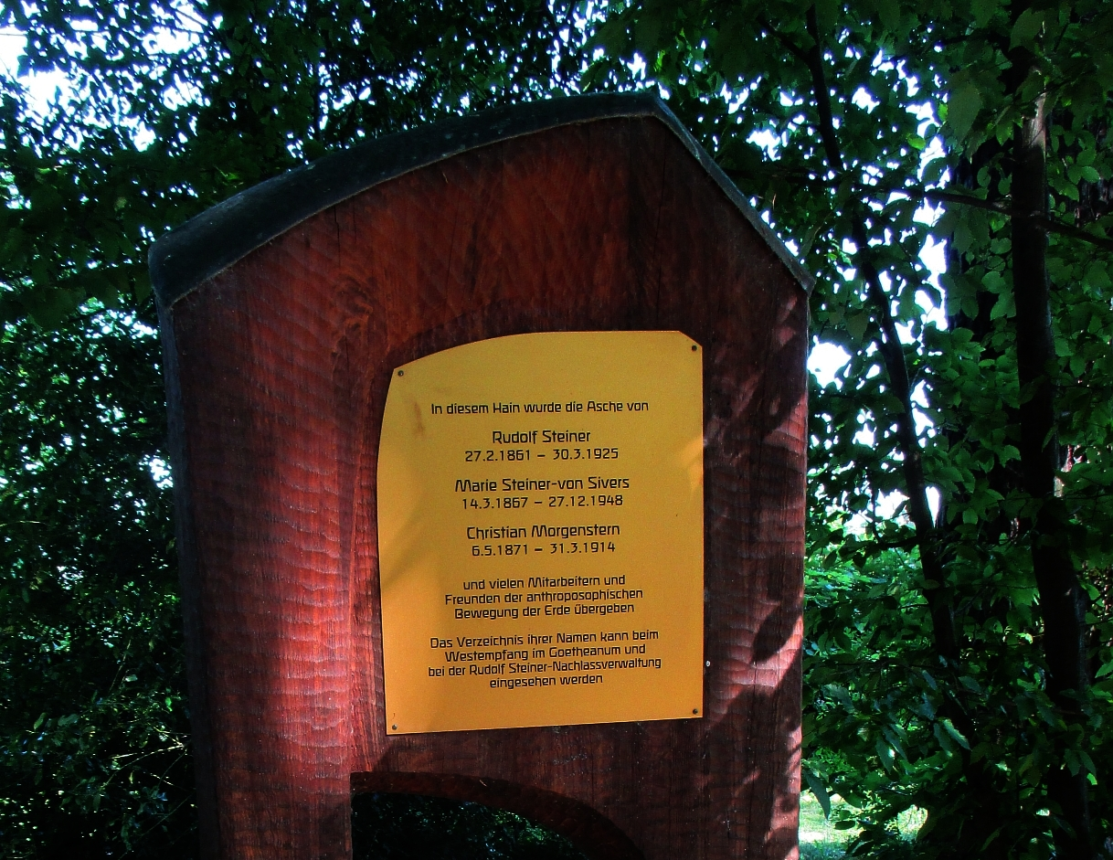 Christian Morgenstern, Gedenkhain, Goetheanum in Dornach, Schweiz